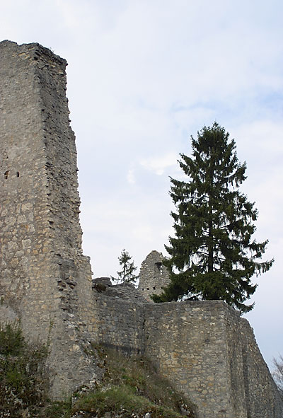 Ruine Farnsburg